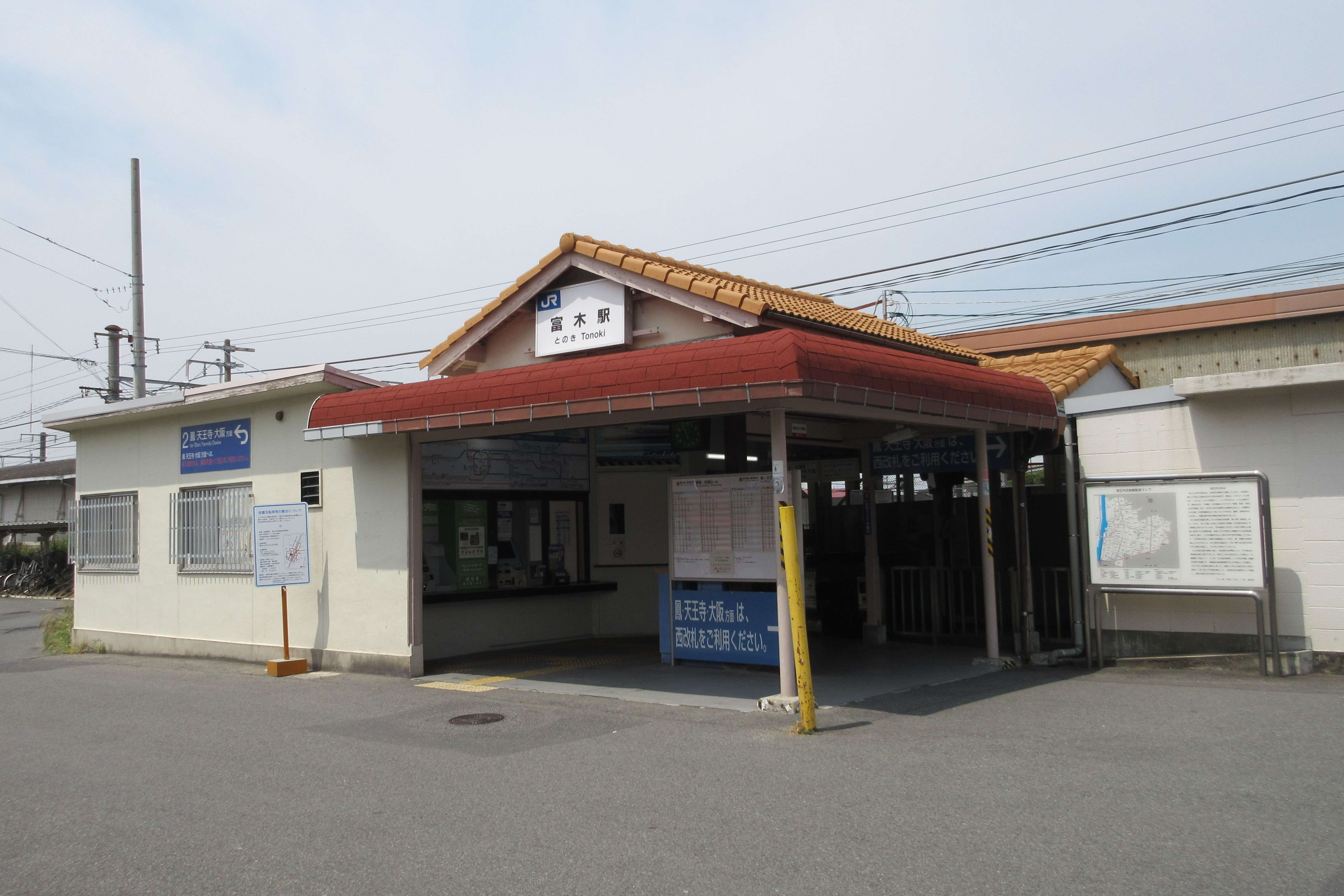 JR富木駅